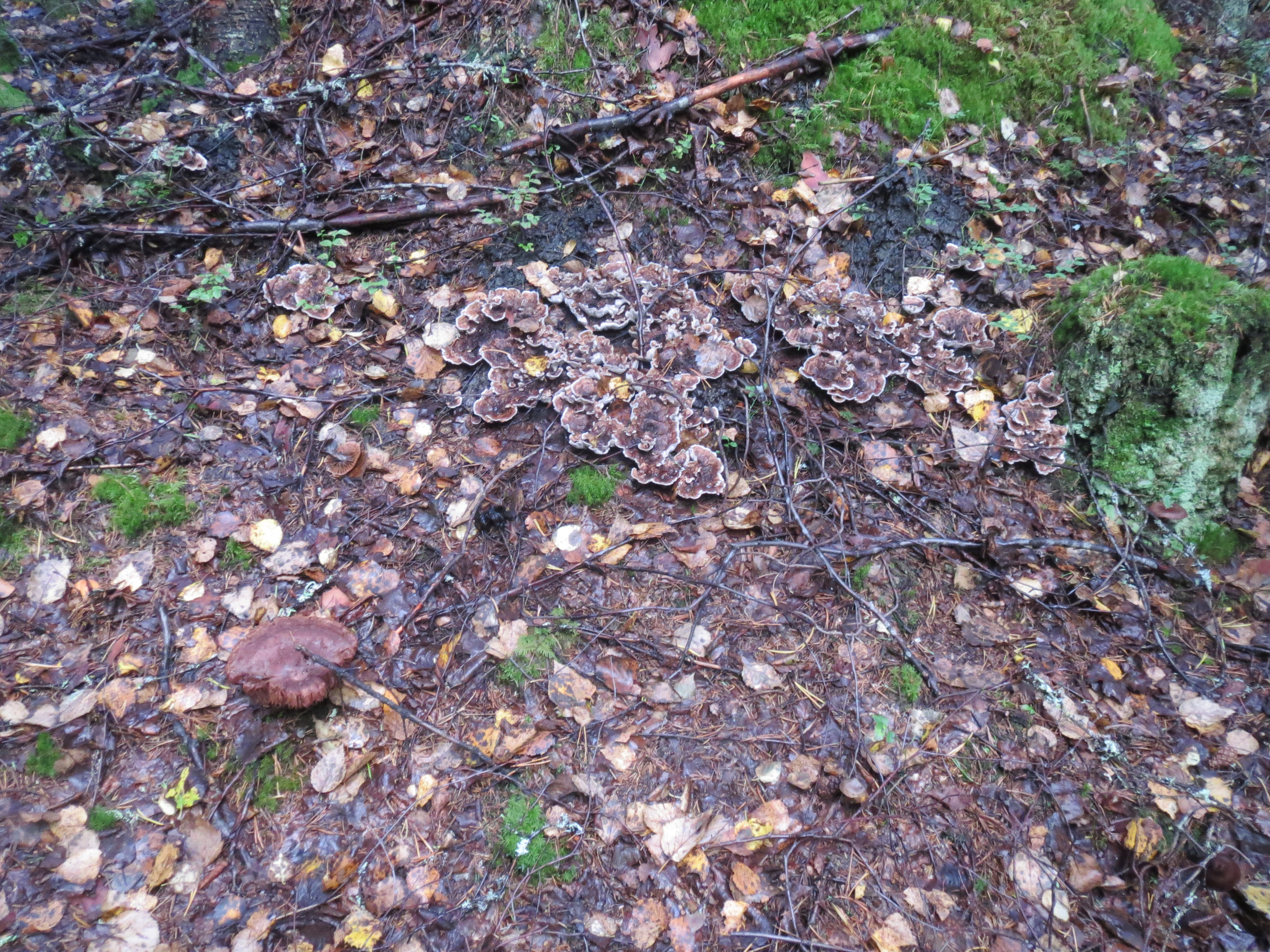 Vyöhykeorakas, Hydnellum concrescens